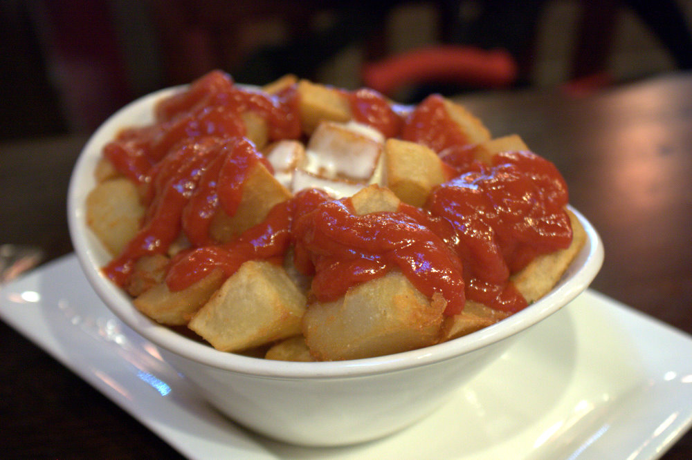 Patatas bravas, servidas en Lizarran (Soho, Nueva York).